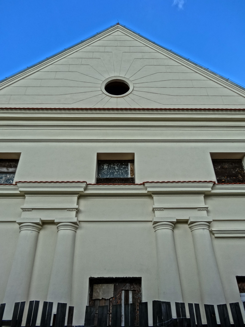 Dawna synagoga żydowska w Bydgoszczy-Fordonie